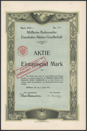 Aktie über 1000 Mark der Müllheim-Badenweiler Eisenbahn-AG vom 1. Januar 1913